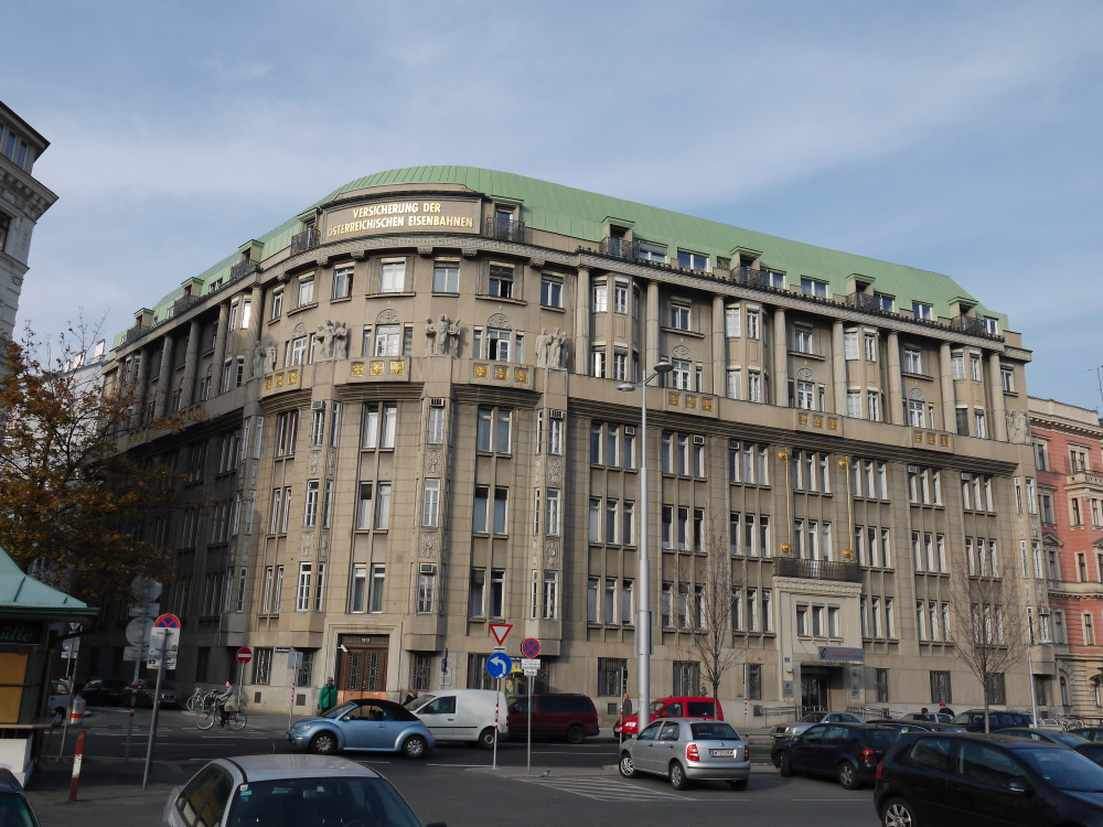 Versicherung der österreichischen Eisenbahnen